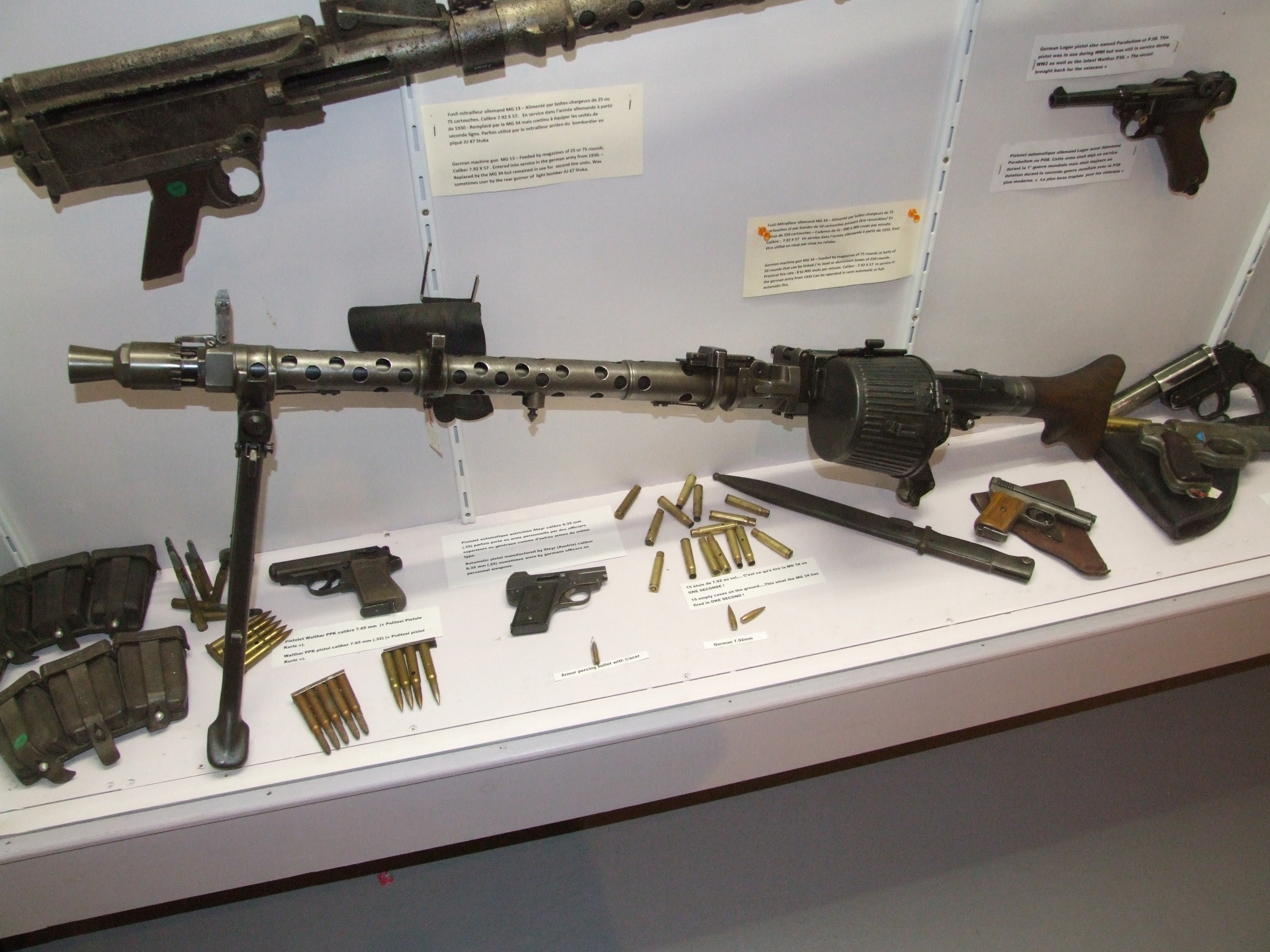 deutsches Maschinengewehr 34 (MG 34) im Mémorial du Souvenir, Dünkirchen